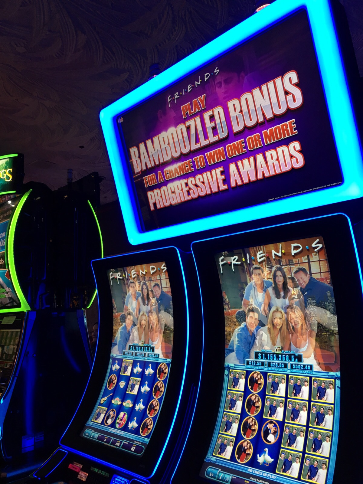 קזינו של הסדרה "חברים"